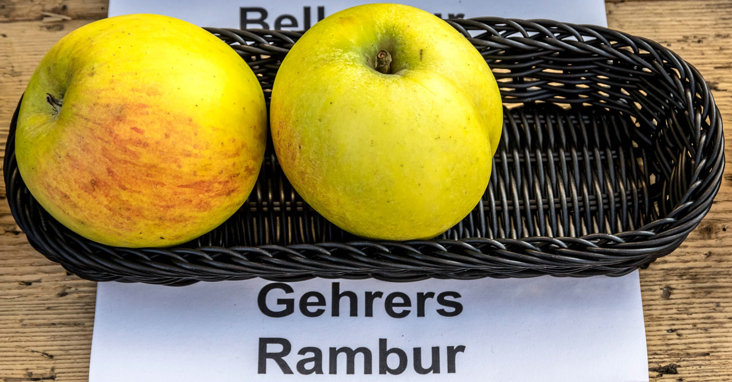 Alte Apfelsorten, von denen es im Badischen noch tragende Bäume gibt. Alle Aufnahmen au dem Oktober 2015